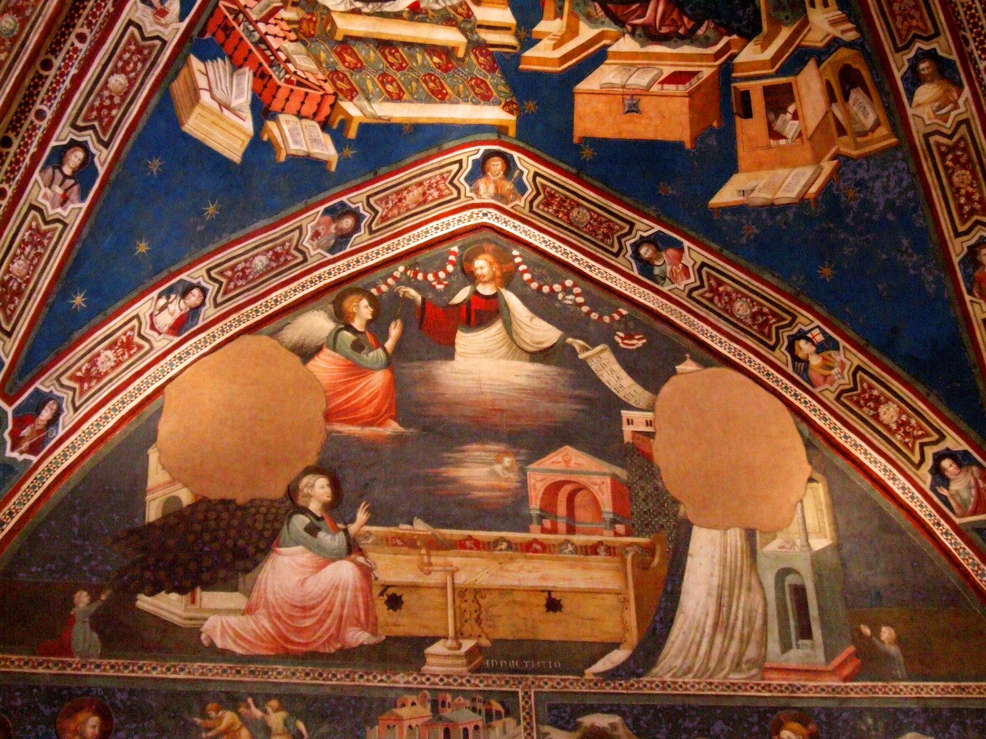 Cappellone di San Nicola, Basilica di San Nicola da Tolentino, Tolentino, Italy